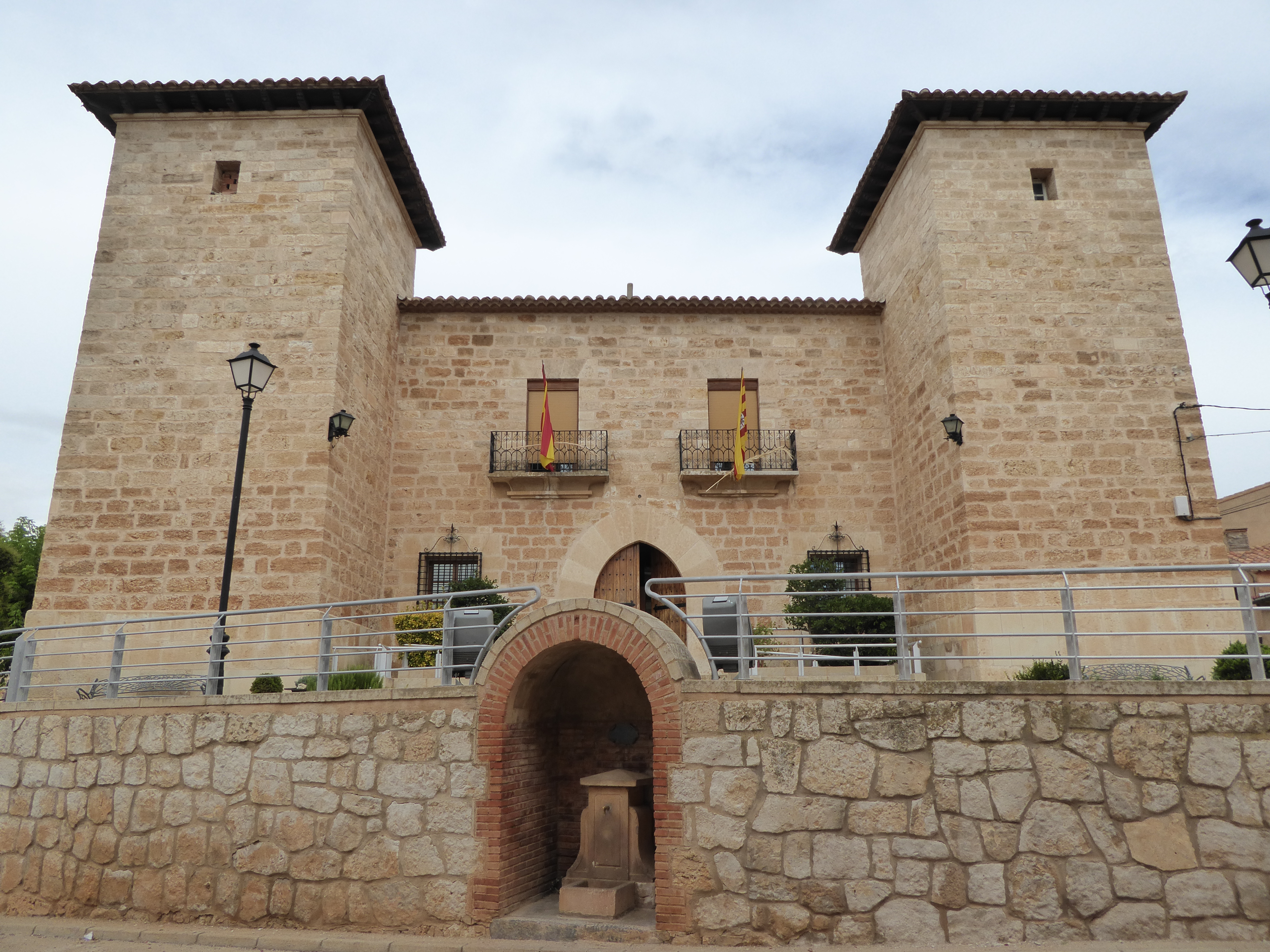 Castillo Palacio de Celadas